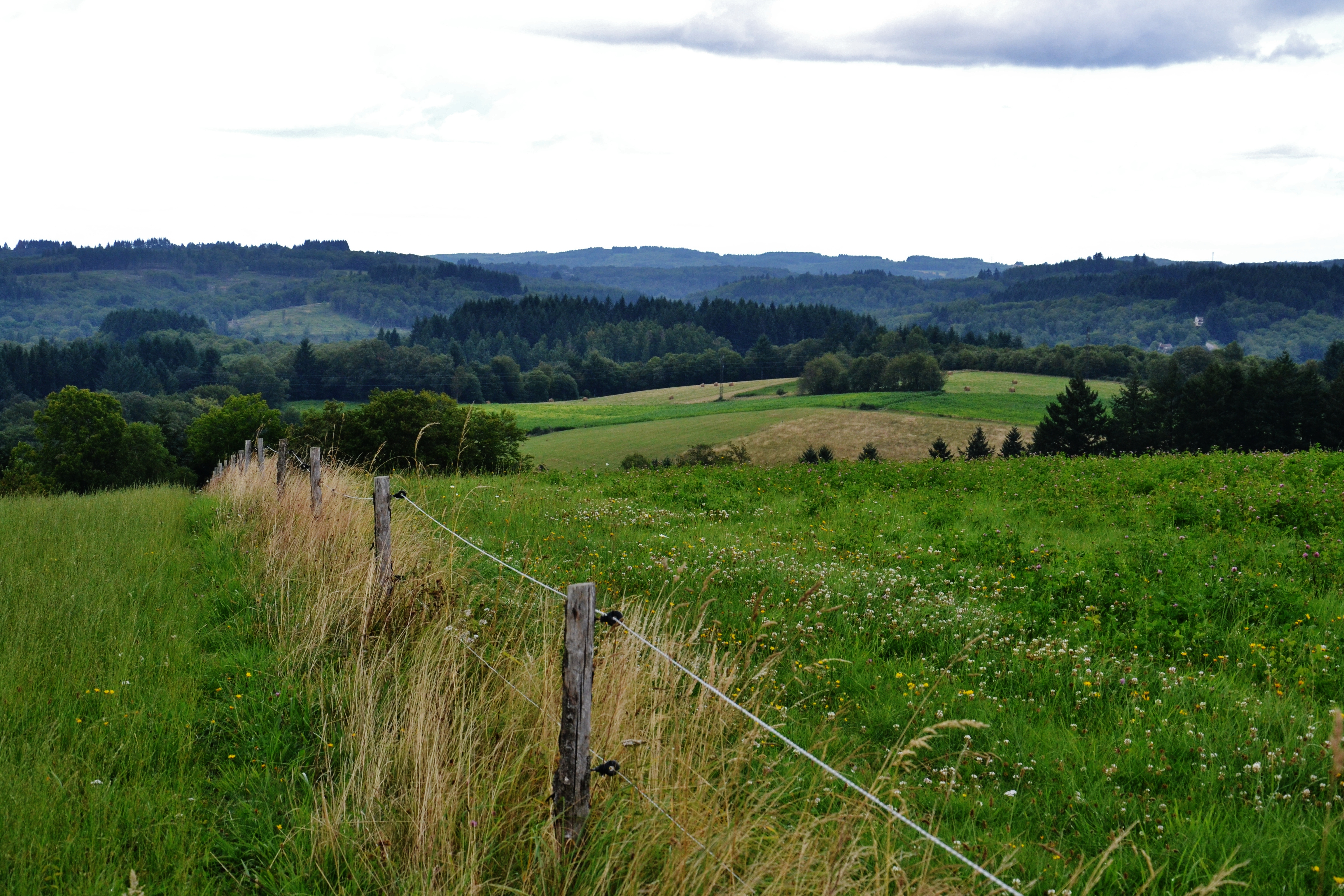 Vue vers le nord sur les monts d'Ambazac depuis le puy du Fros (537 m.), commune de Saint-Sylvestre (Haute-Vienne, France)